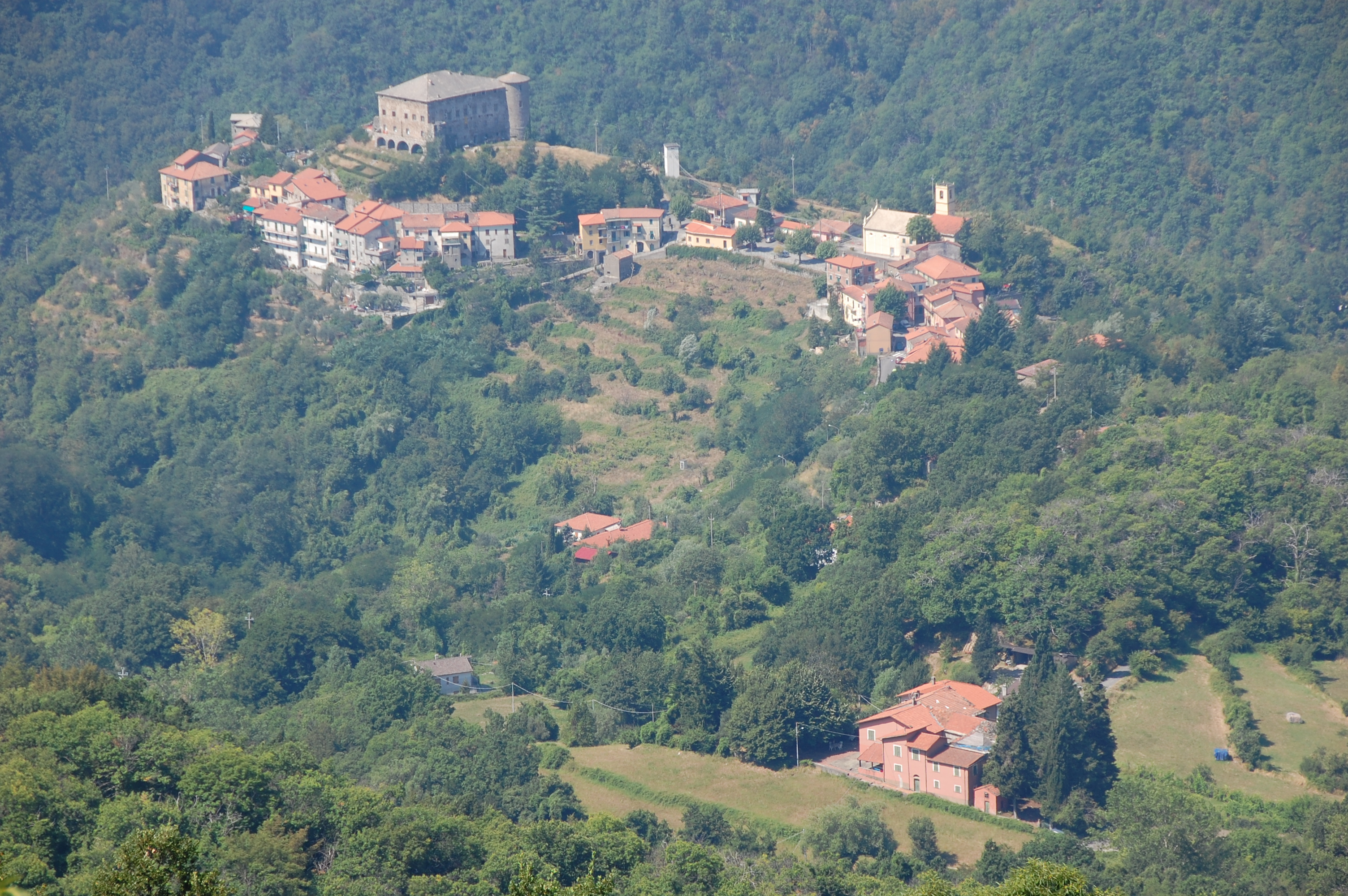 Panorama Calice Castello